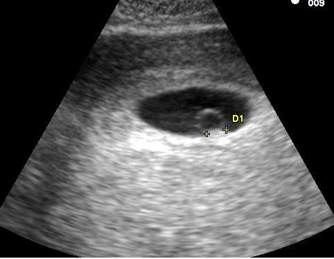 Embryon de 5 semaines. L'embryon est entre les deux croix, il mesure 3 mm. La structure ronde au dessus est la vésicule ombilicale. Embryo at 5 weeks wtih yolk sac above.